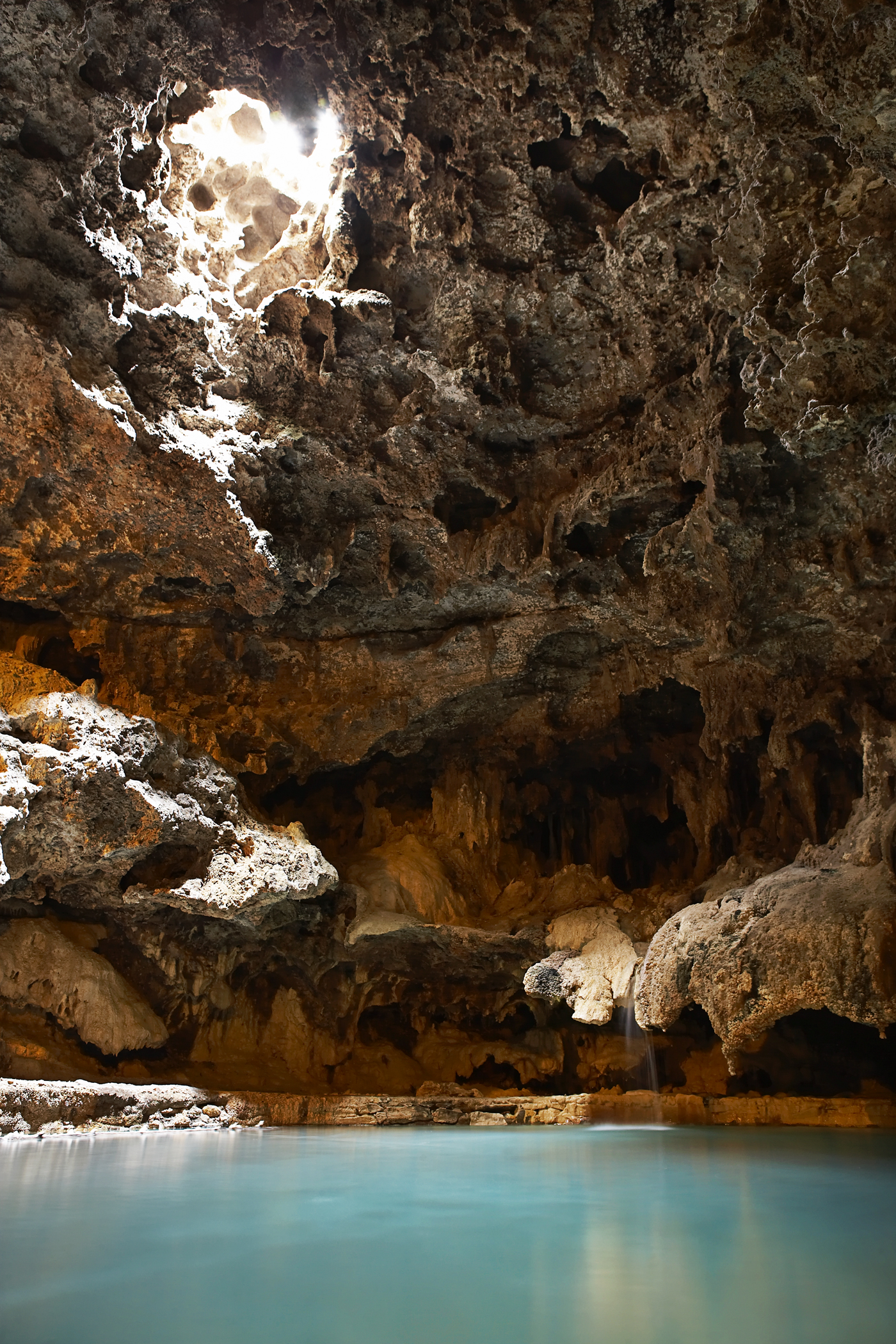 Lieux historique à Banff, Alberta. Nommé Cave and Bassin, c'est ce lieu qui a donné naissance au Parc National de Banff.